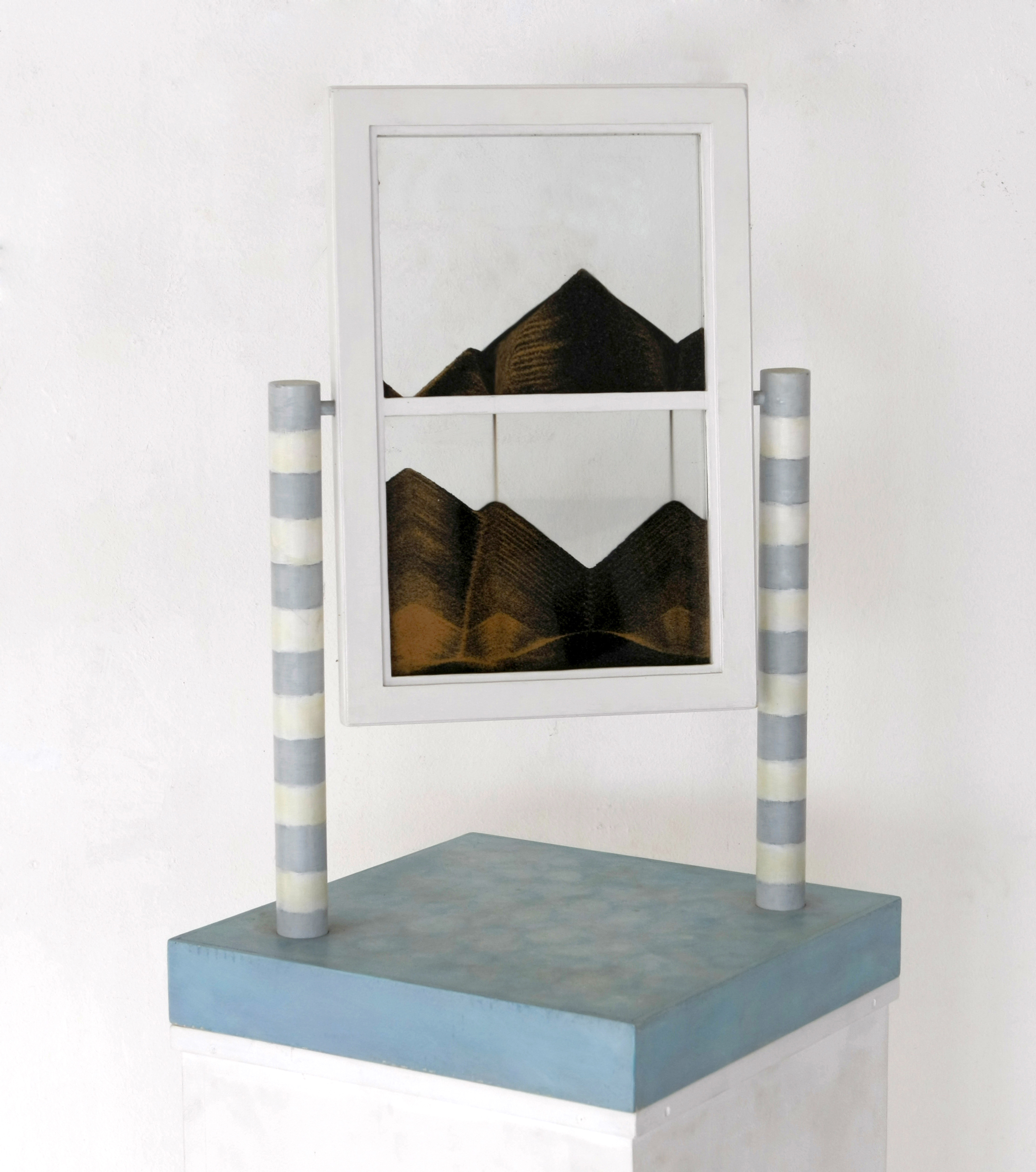 Ägyptischer Spiegel, 1996,Sandobjekt, variabel